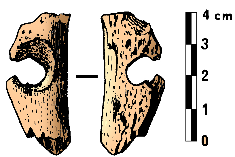 Hueso perforado de la Cueva de las Grajas (Archidona, Málaga)